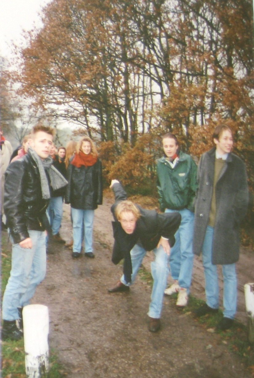 Amsterdamse Dispuut Demeter van de SSRA aan het Klootschieten in Twente